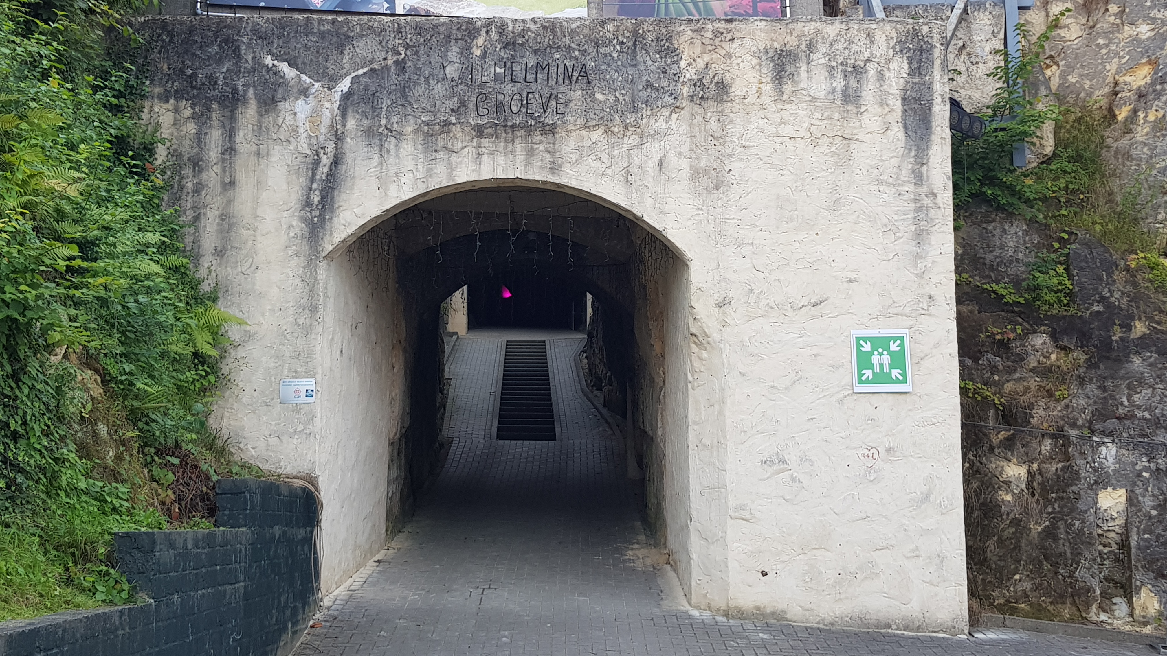 Wilhelminagroeve, Valkenburg, Nederland